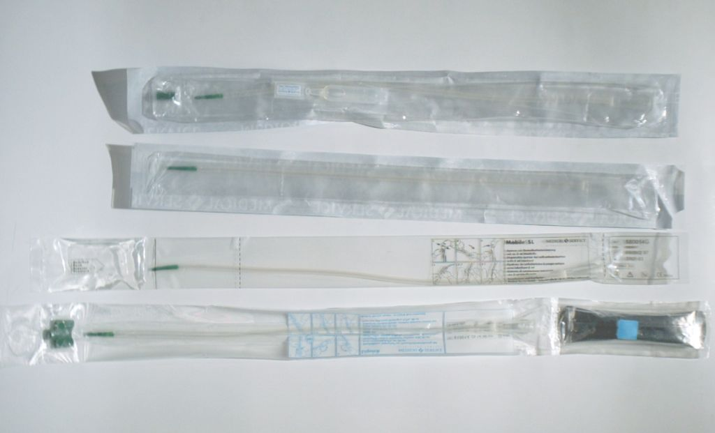 Moderne Katheter für intermitierenden Fremd- oder Selbstkatheterismus.